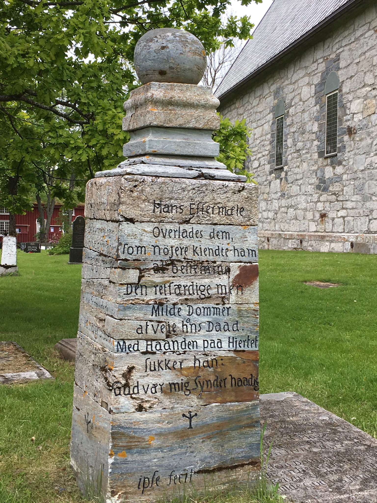 Gravstøtta, Alstahaug k. i bakgrunnen